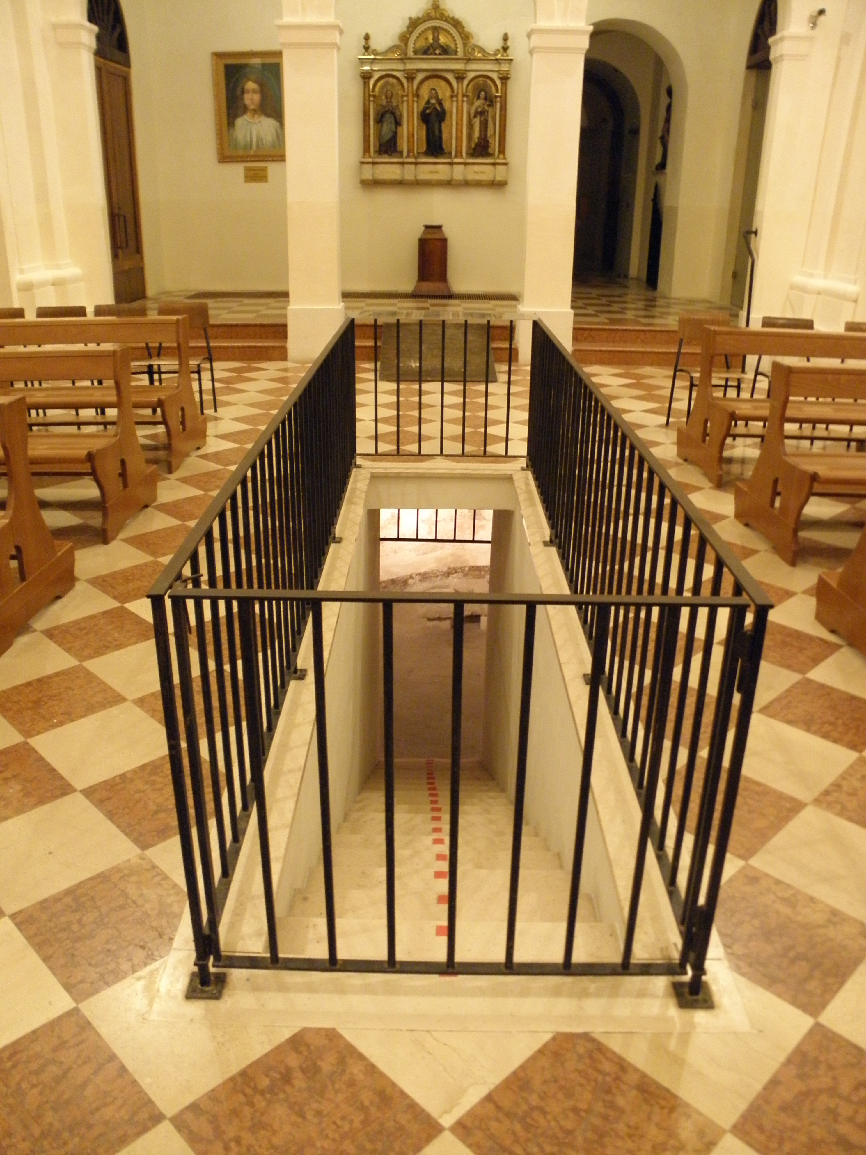 Adria, Cattedrale dei Santi Pietro e Paolo: sacello della seconda cattedrale (X secolo) posto sotto la vecchia cattedrale ora parte dell'attuale edificio.